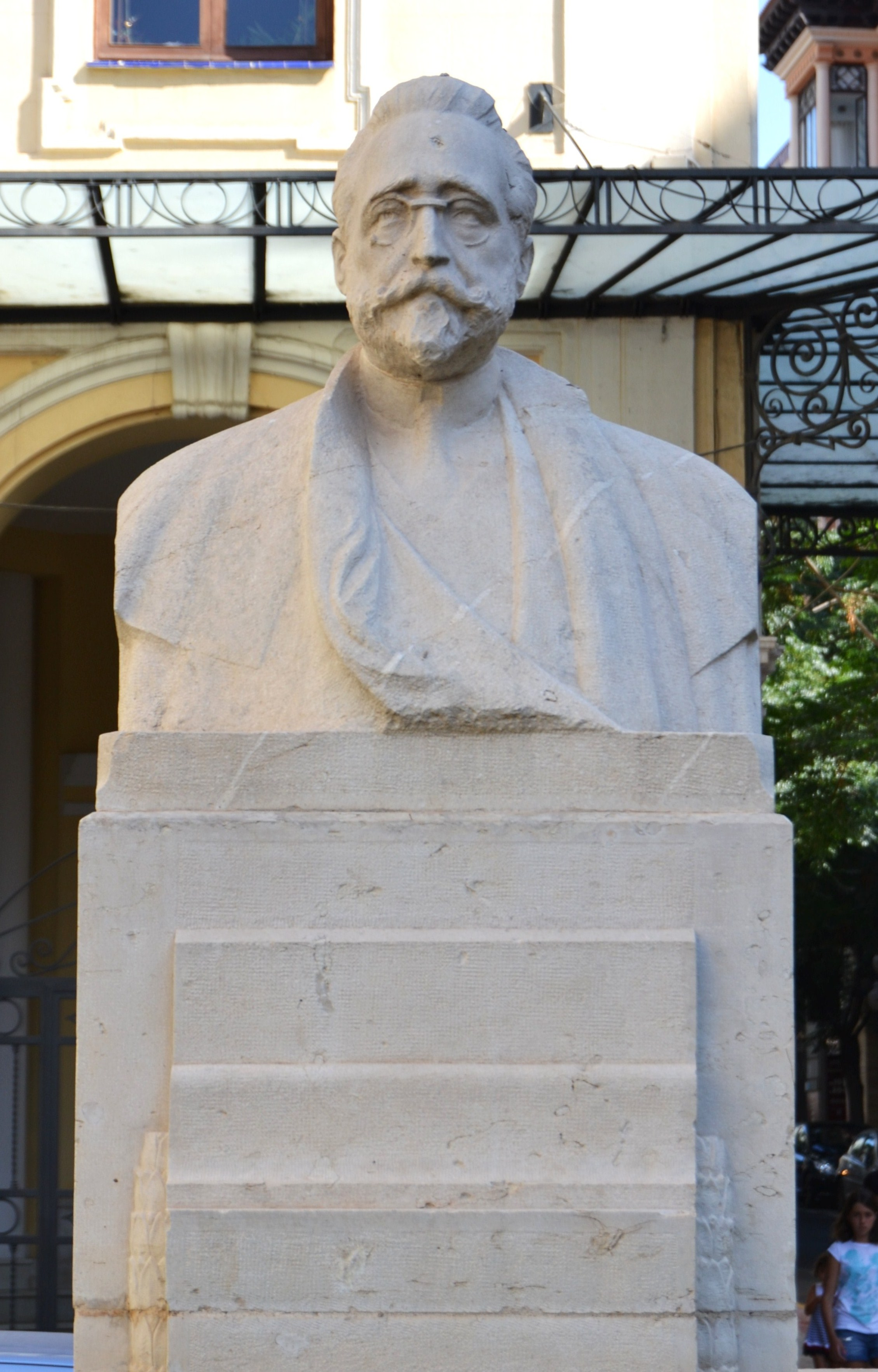 Monument a Ruperto Chapí, Alacant. El monument fou realitzat per Vicent Bañuls i es va inaugurar el 25 de març de 1930, data d'aniversari de la mort del músic.